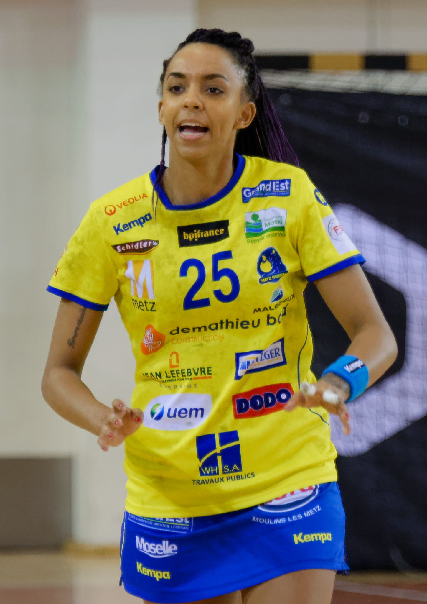 Marie-Hélène Sajka lors de Issy Paris / Metz Handball. Le 14 mars 2018.